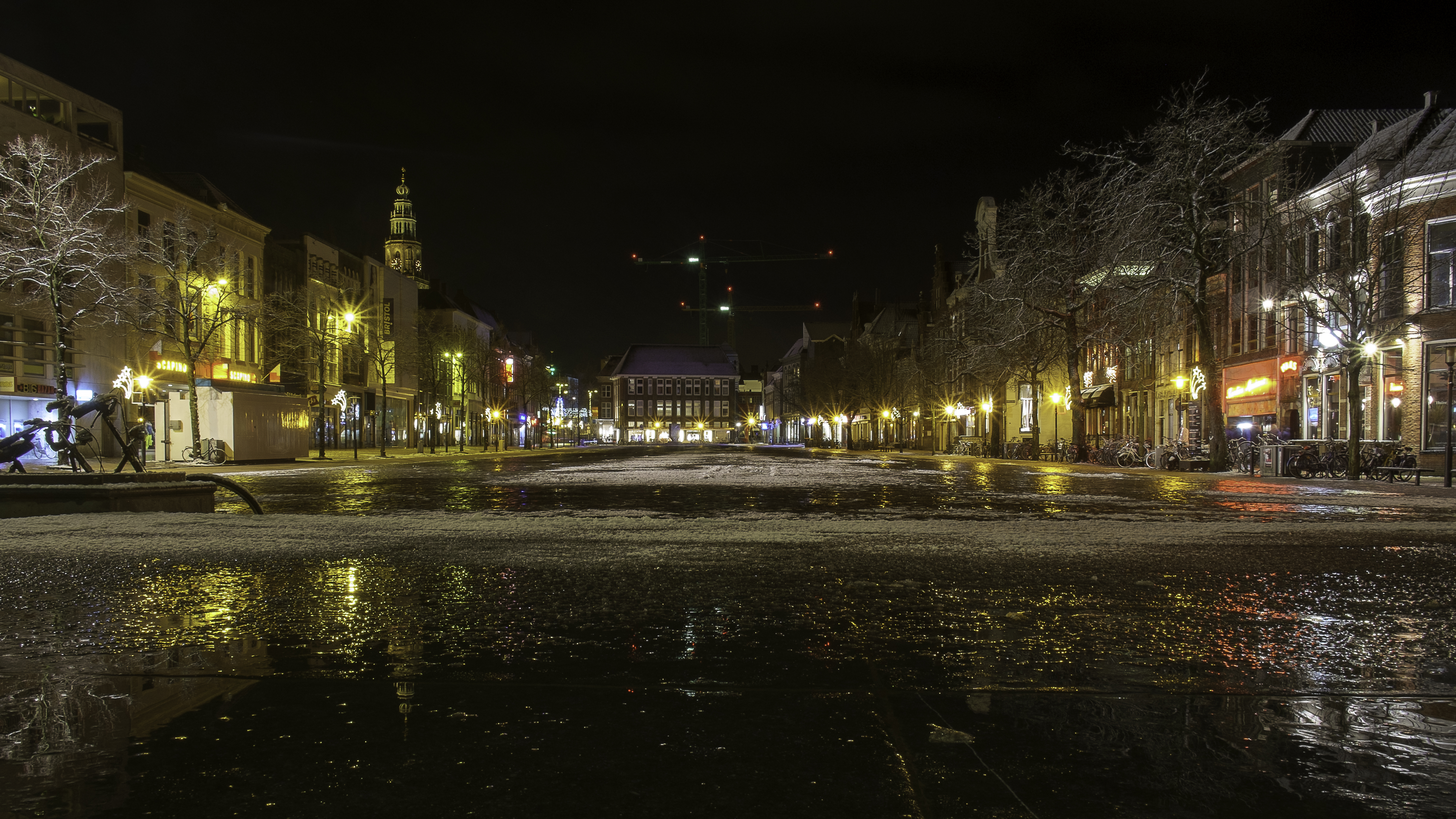 Vismarkt bij avond